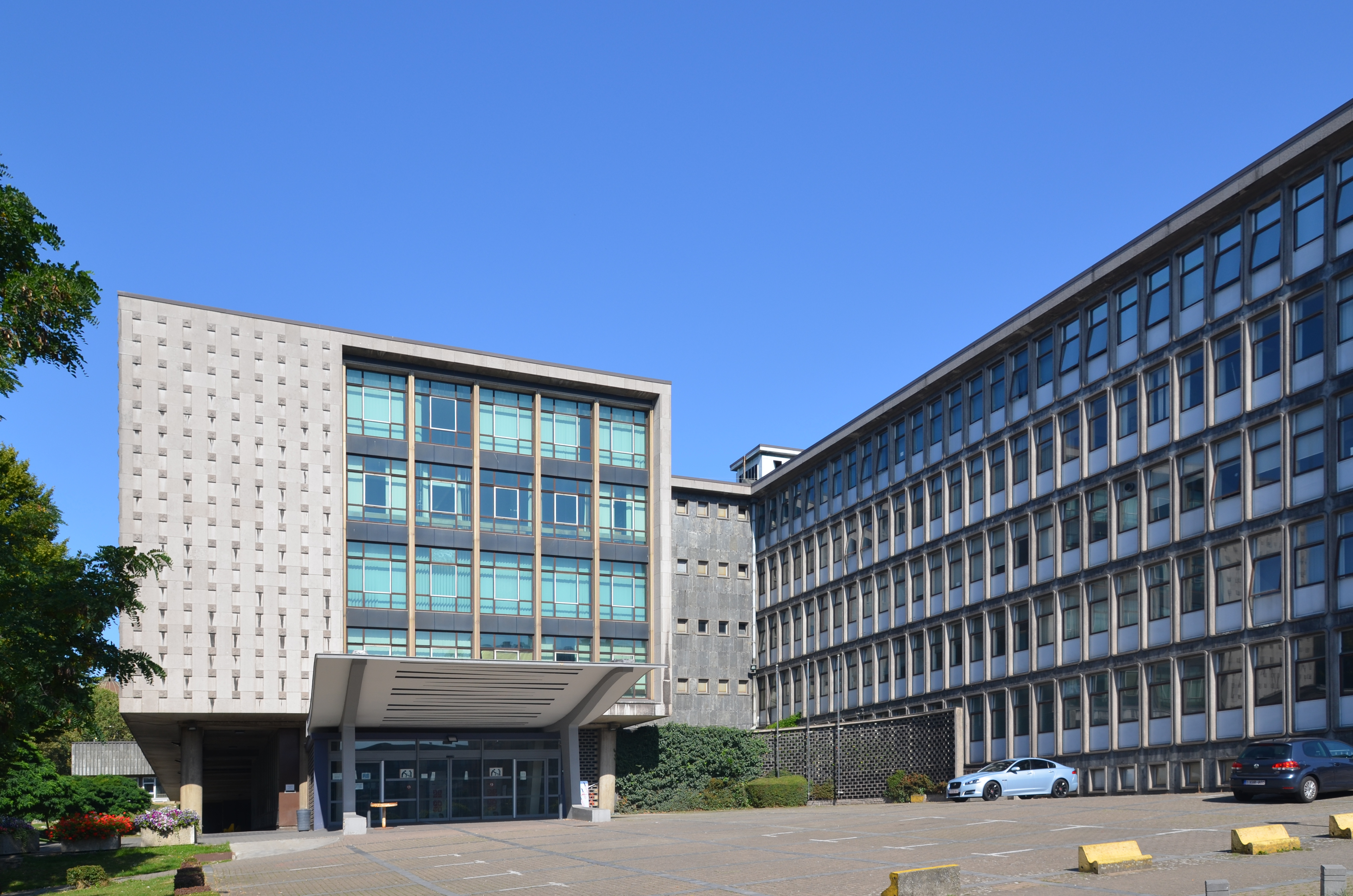 Jacques Depelsenaire - Palais de justice de Charleroi - Entrée principale côté avenue Général Michel.